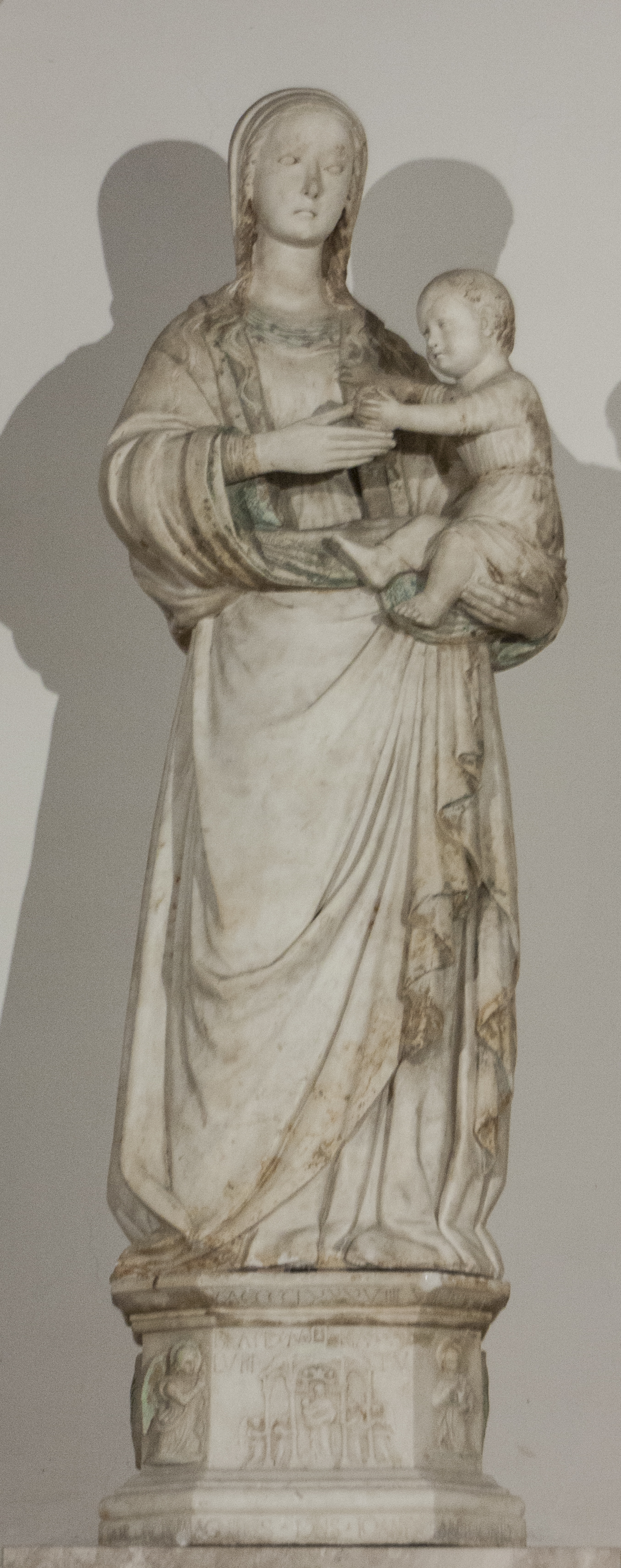 Madonna di Loreto - Francesco Laurana 1489 Presso la Cappella della Madonna di Loreto